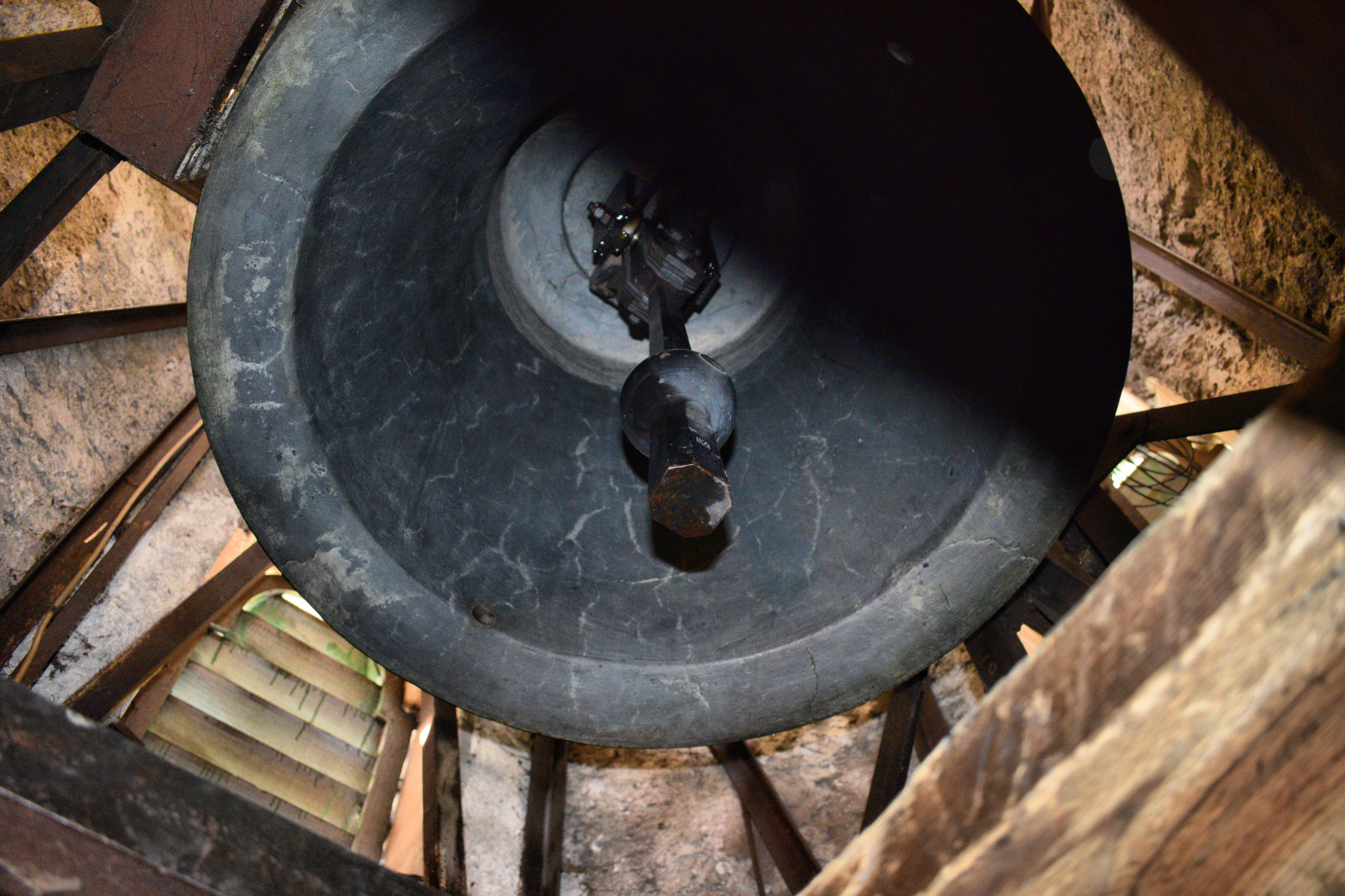 Glocke in der Kirche St. Jakob